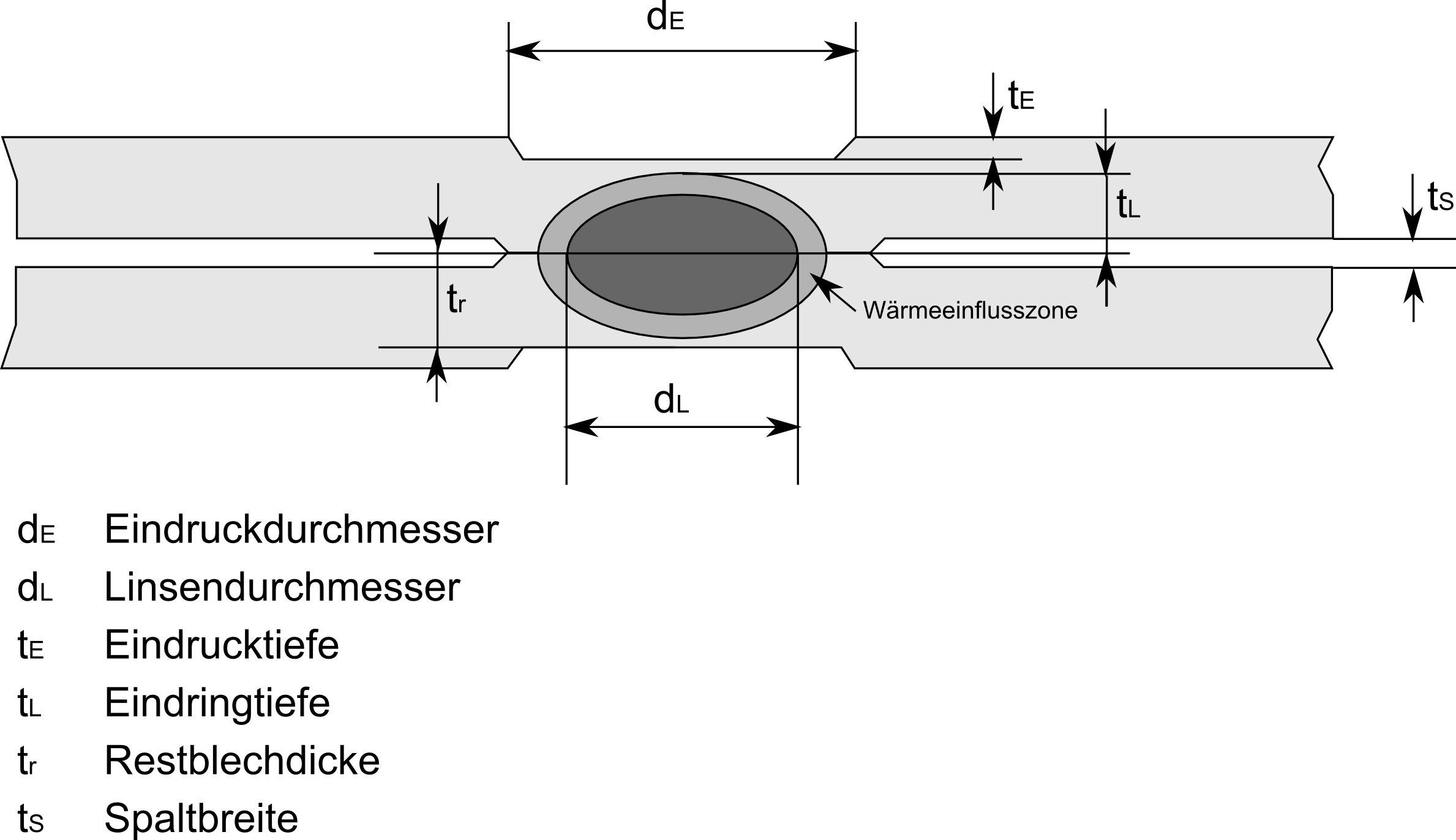 Widerstandspunktschweißen - Bezeichnungen eines Schweißpunktes